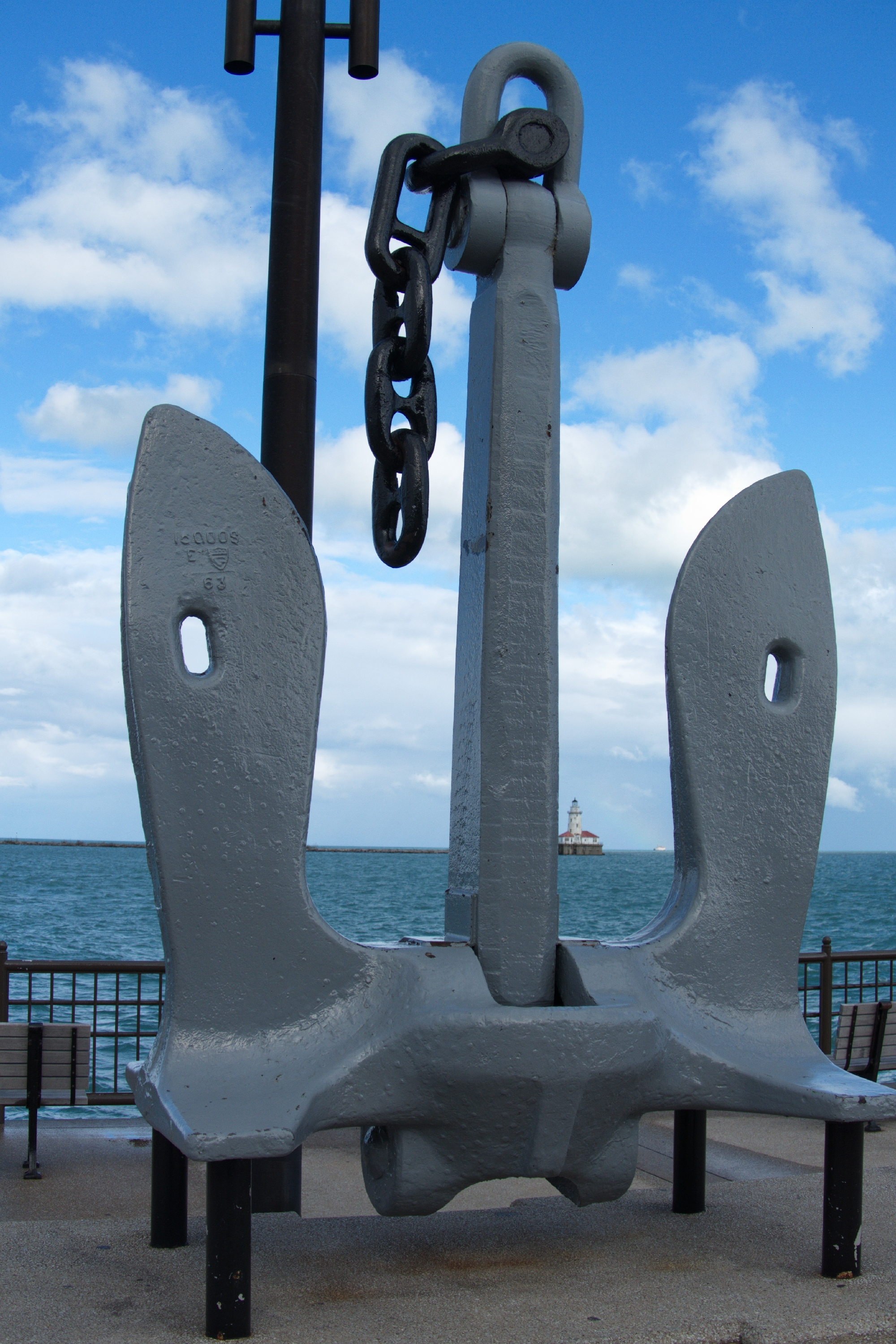 Anker des Kreuzers USS Chicago CA-136, Navy Pier, Chicago